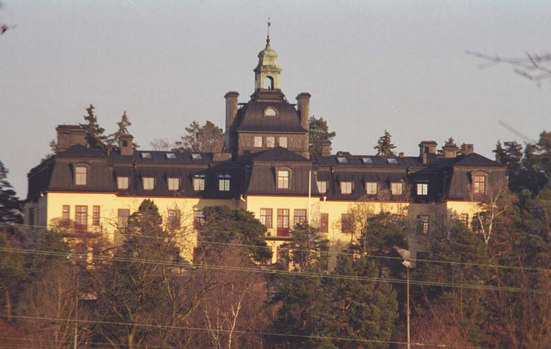 Fristad. Hem för fallna kvinnor. Arkitekt Fritz Eckert